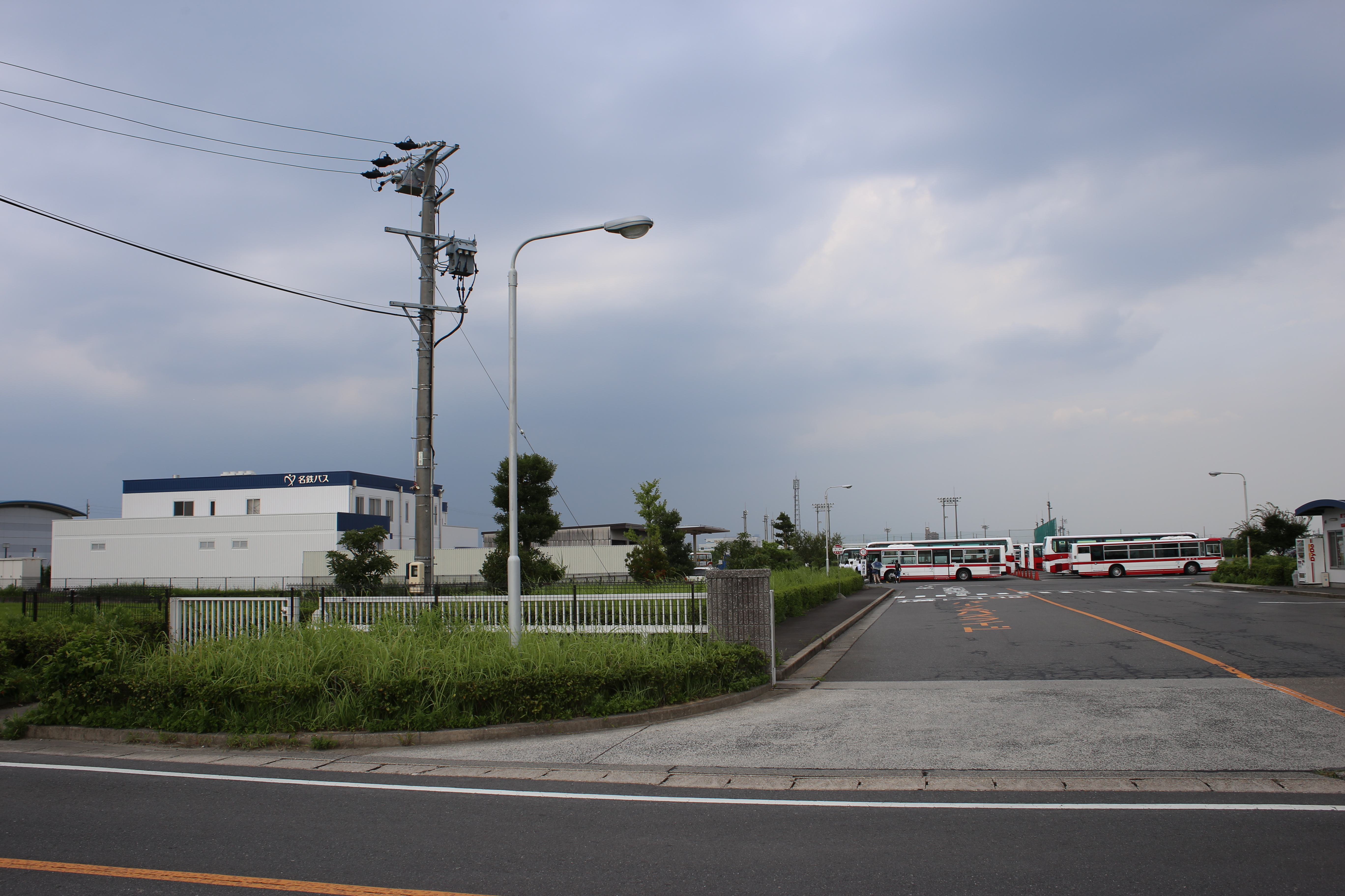 愛知県津島市大坪町字大割の名鉄バス津島営業所を西側公道より撮影